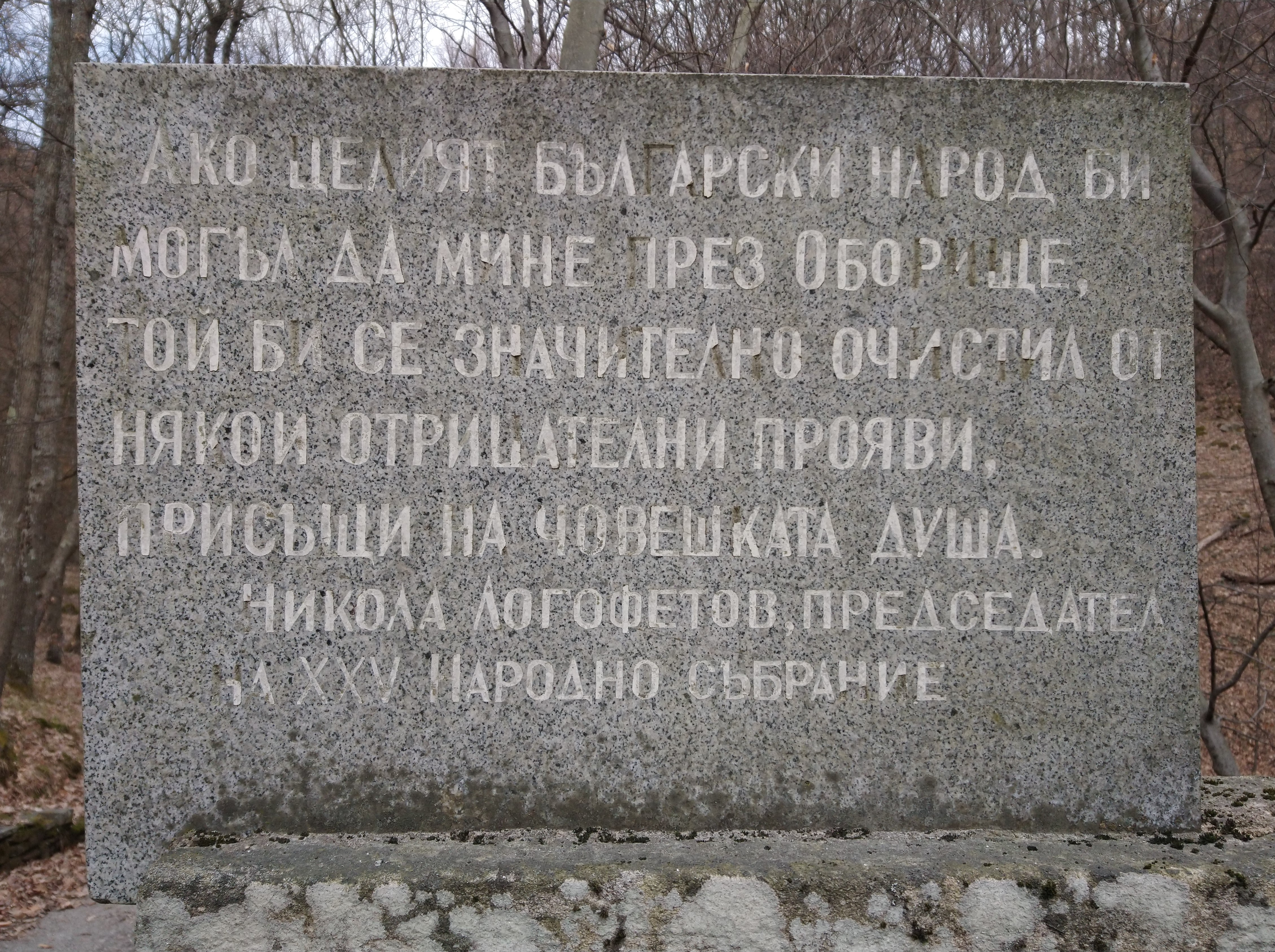 Оборище - плоча с цитат на Никола Логофетов: "Ако целият български народ би могъл да мине през Оборище, той би се значително очистил от някои отрицателни прояви, присъщи на човешката душа."